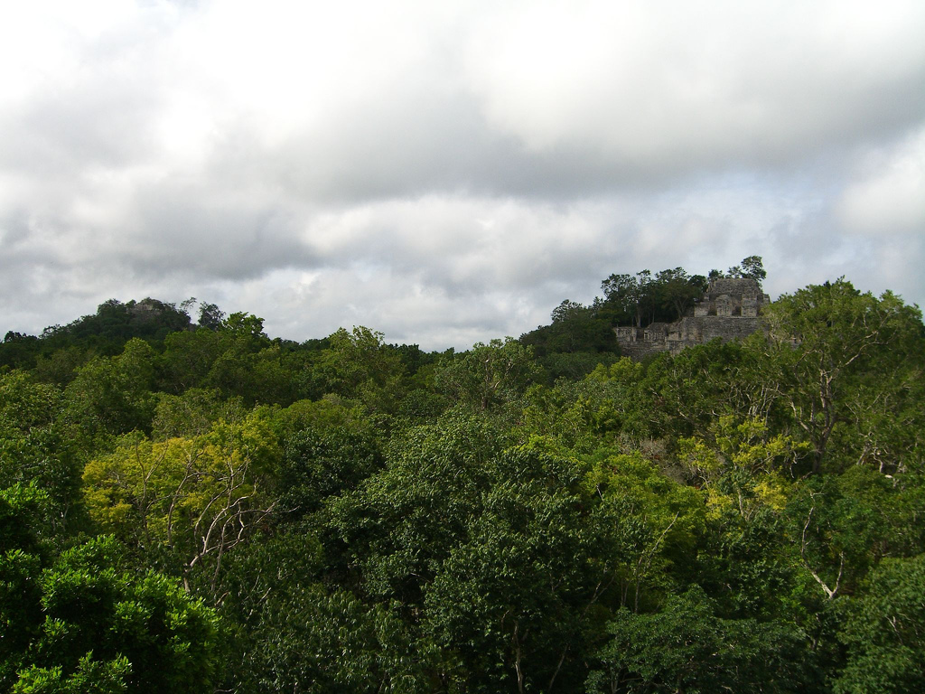 Zona arqueológica de Calakmul.